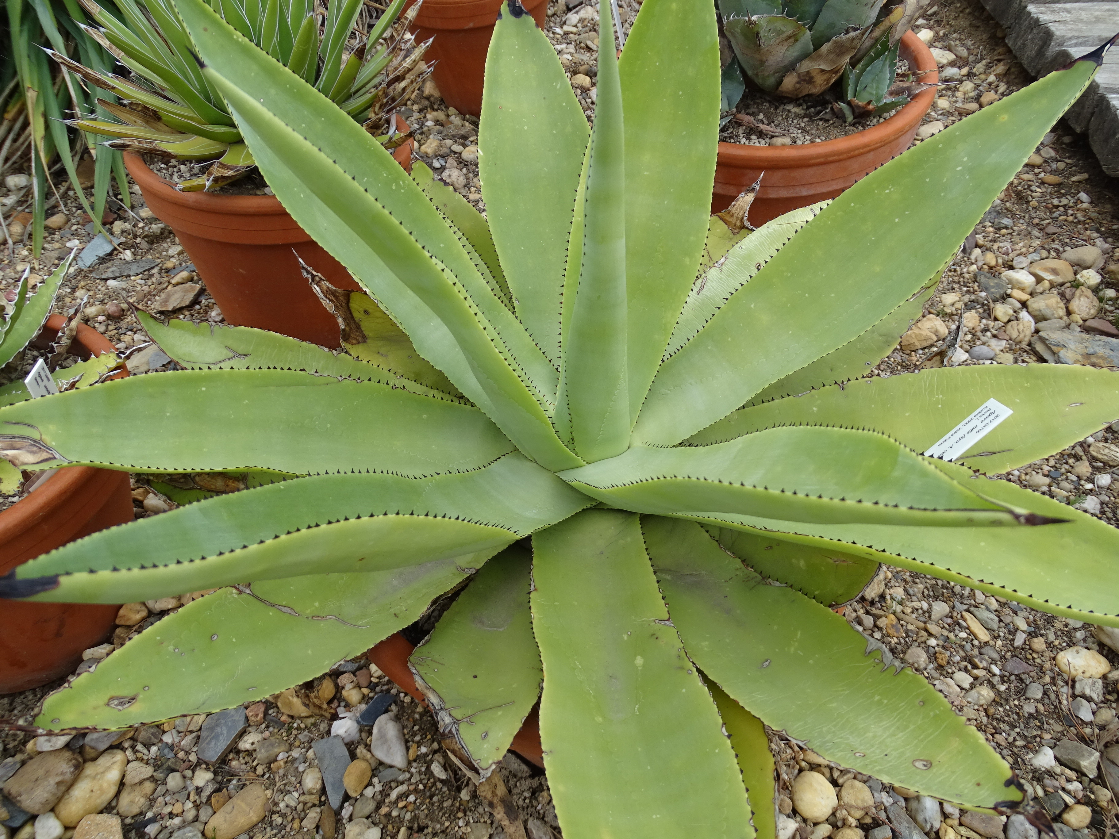 Botanická zahrada Praha